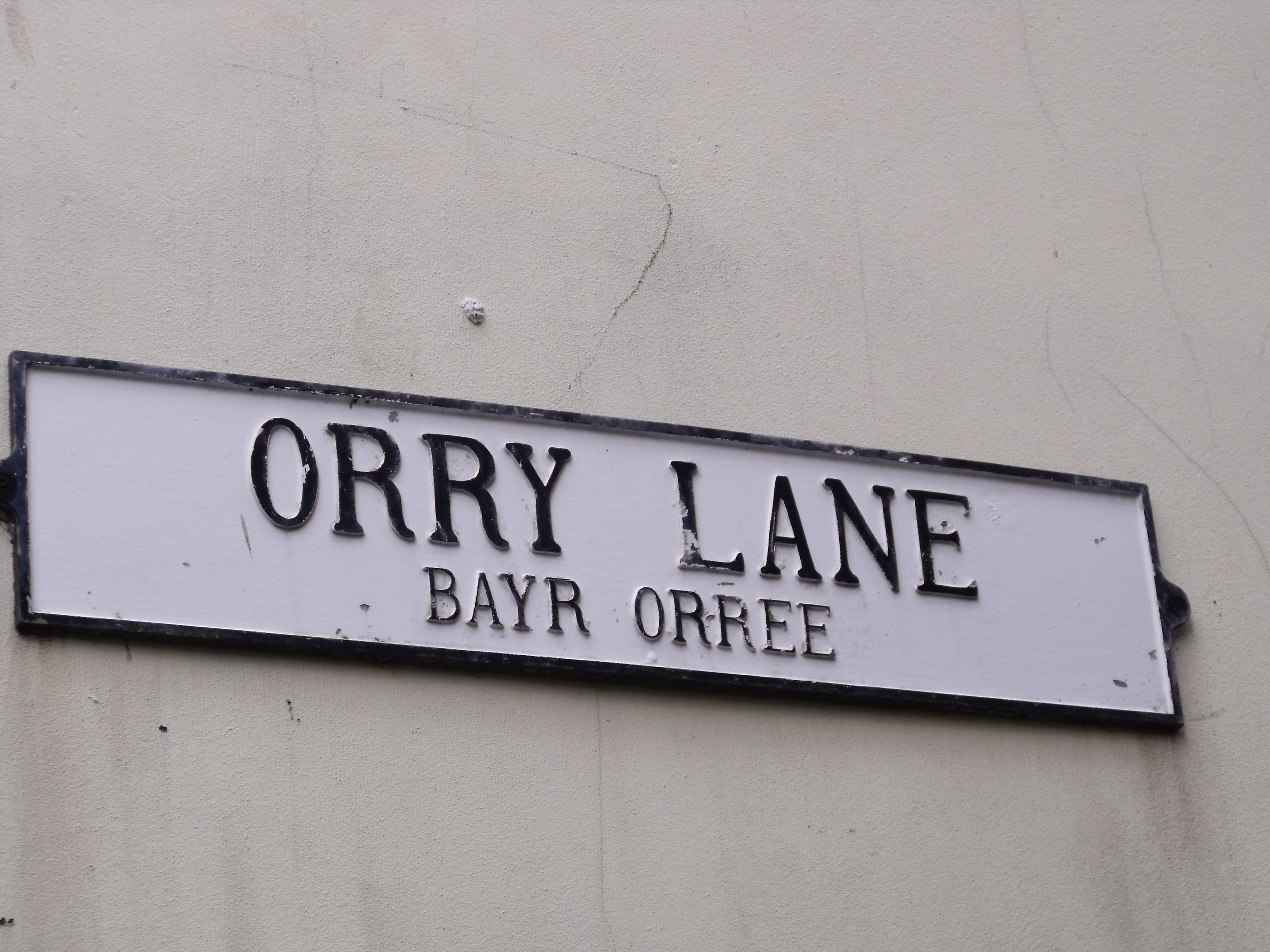 Orry Lane. Peel. Isle of Man.